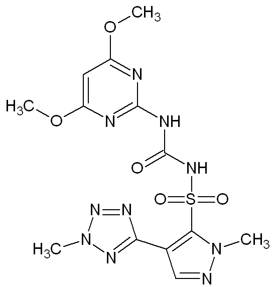 Structure of azimsulfuron